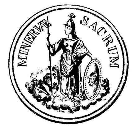 Sigillum maior Senatus Minervae Sacrum